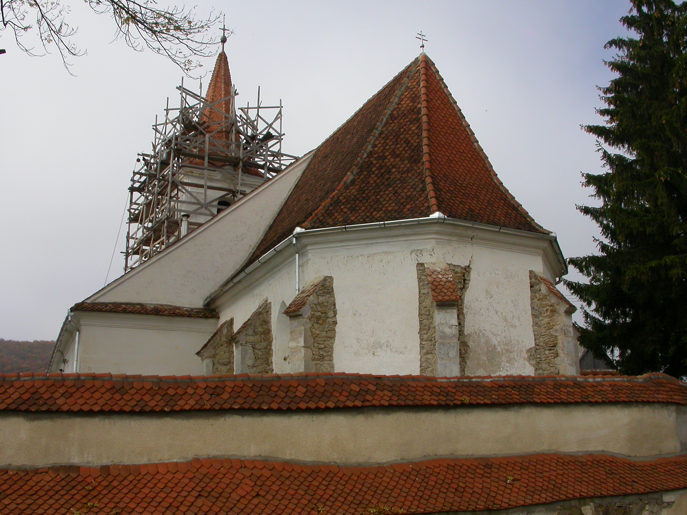 Ansamblul bisericii romano-catolice "Zămislirea Sf. Fecioare", sec. XV - XIX